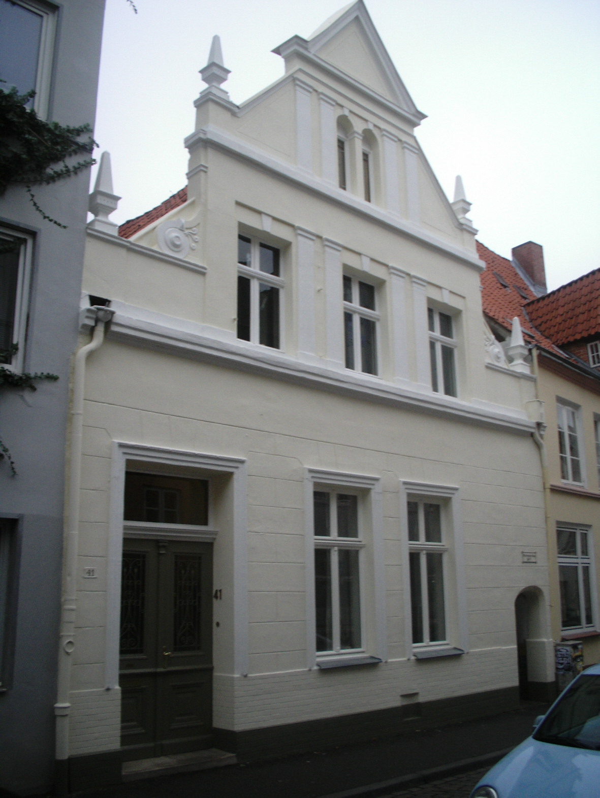 Das ehemalige Kino Rio in der Hundestraße 41 in Lübeck. This is a photograph of an architectural monument. It is on the list of cultural monuments of Lübeck